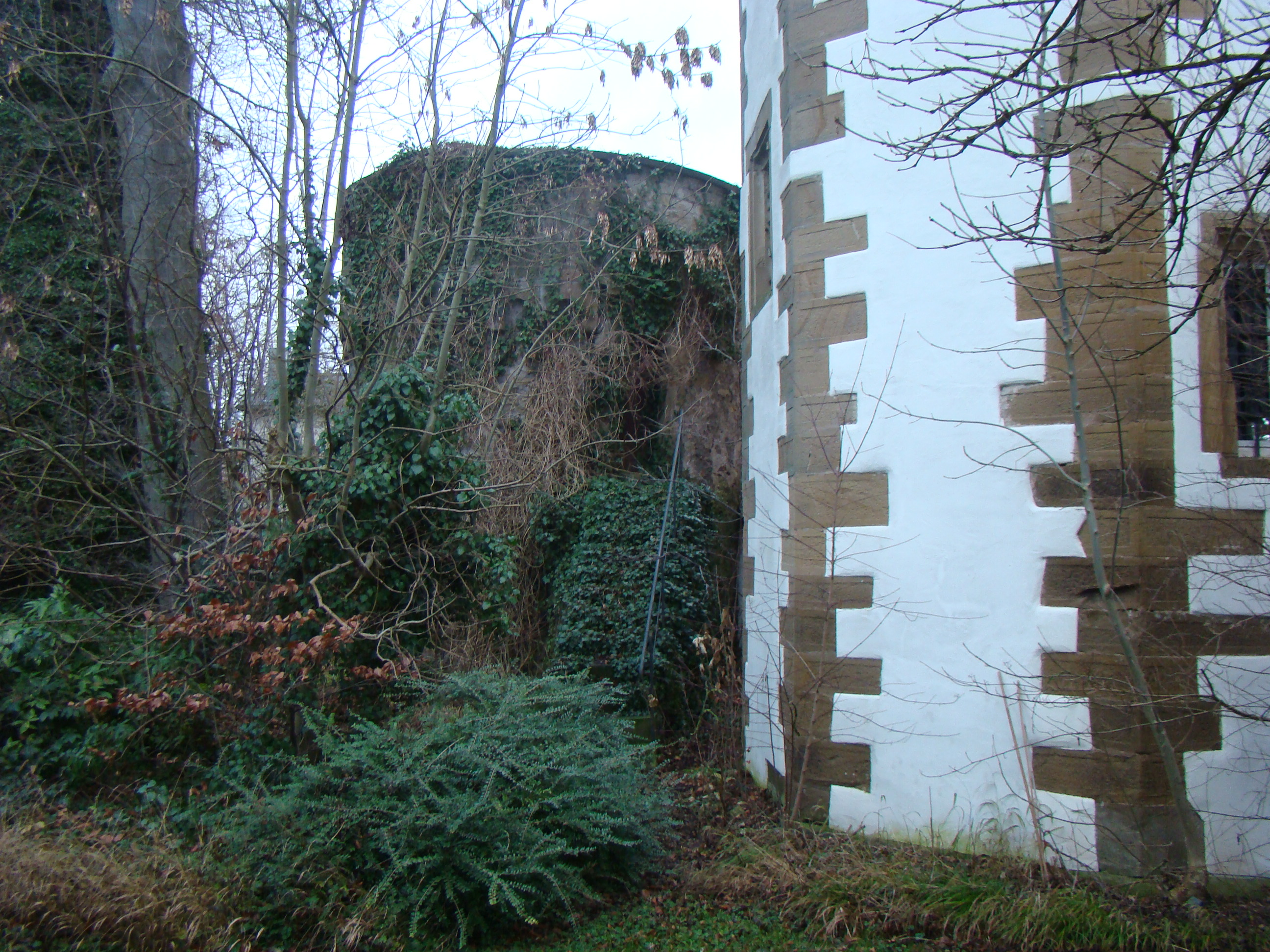 Alter Turm beim Unterschloss in Gemmingen